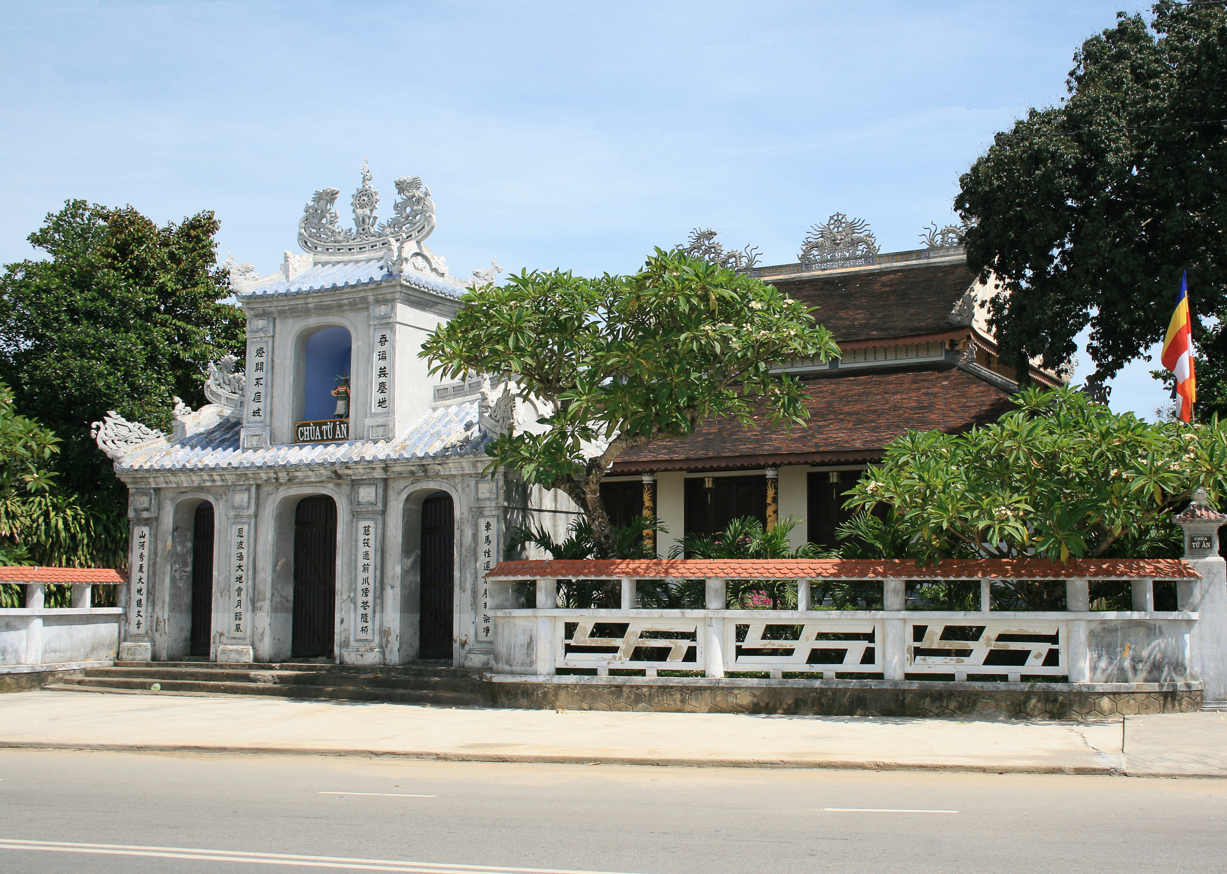 Chùa Từ Ân, Huế. (Từ Ân Pagoda)